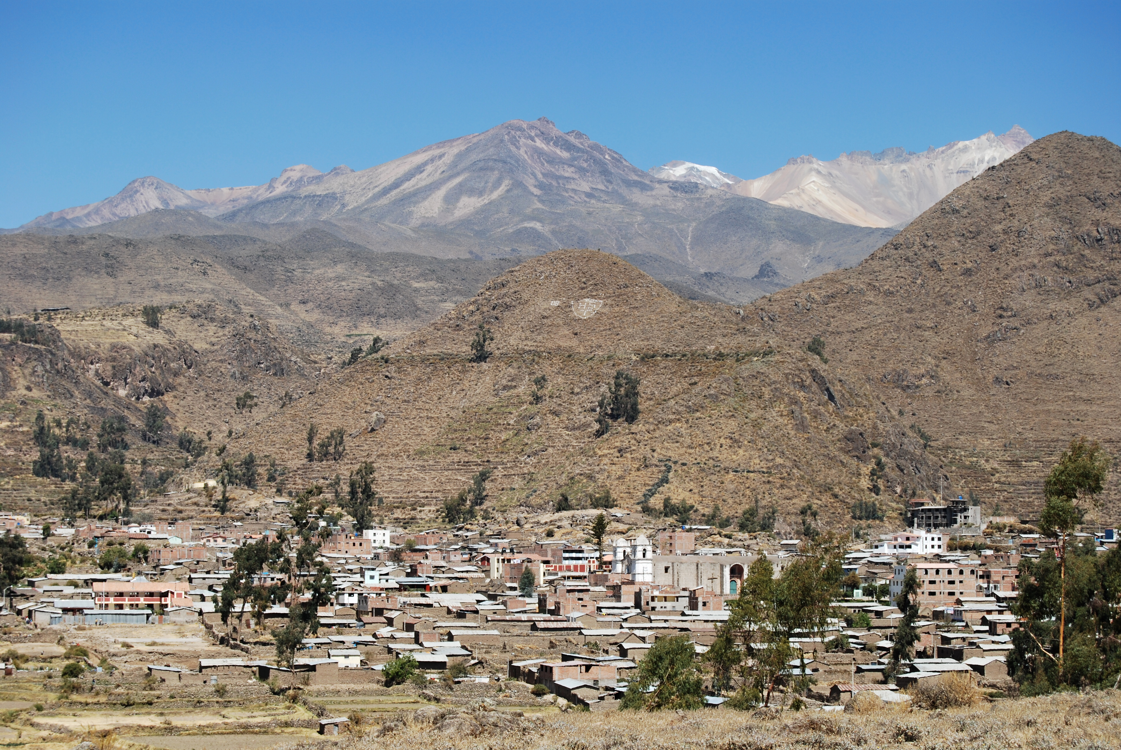 Cabanaconde - Caňon del Colca